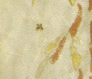 Vergrößerter Ausschnitt: Codex Ragyndrudis.jpg